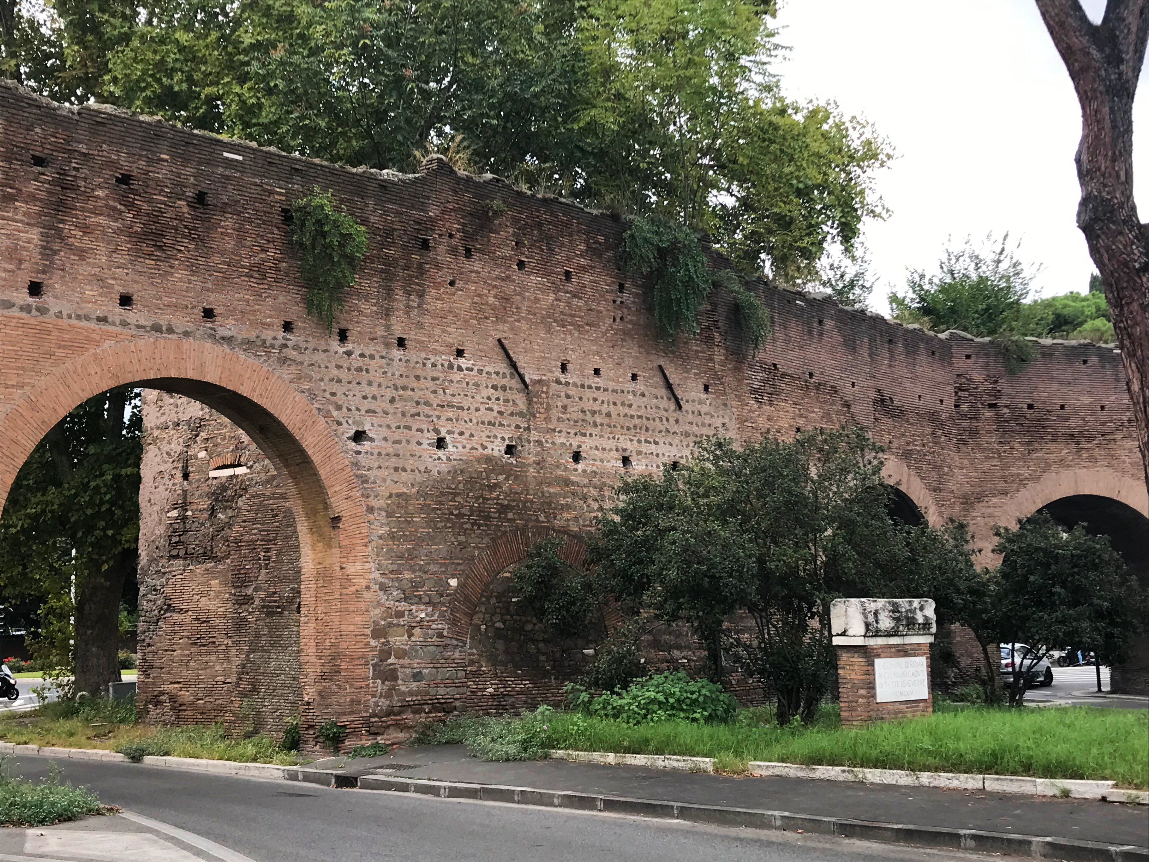 Porta Metronia a Roma, Italia